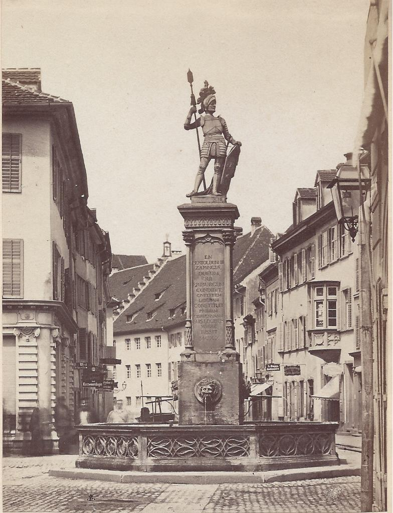 Blick aus der Salzstraße auf den Bertholdsbrunnen in Freiburg im Breisgau. Abzug um 1880 von einem Negativ aus den 1850er Jahren, erkennbar an der langen Belichtungszeit und der noch fehlenden Gründerzeitbebauung der rechten Straßenfront. Untertitelt: "Fribourg en Brisgau / Statue du Duc de Zähringen le fondateur de la ville de Fribourg". Diese Aufnahme diente als Vorlage der Abbildung im Führer durch Freiburg des Herder-Verlages von 1881.